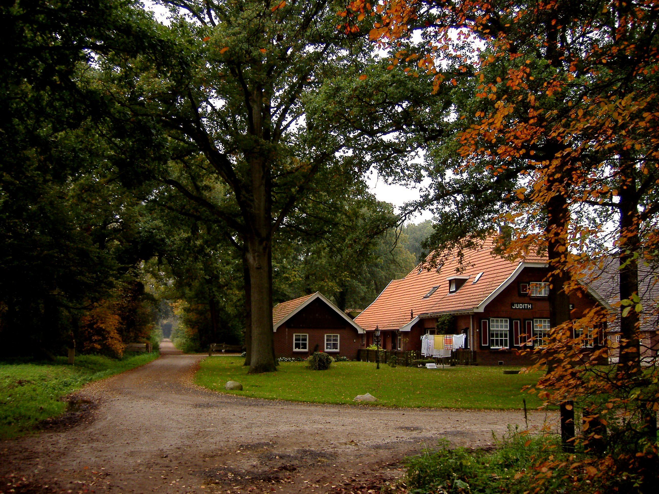 De Judithhoeve is een vroeg 20e eeuwse, als proefboerderij gebouwde boerderij van het kop-romp type gelegen aan de Judithoeveweg 5, 7581 DL Losser